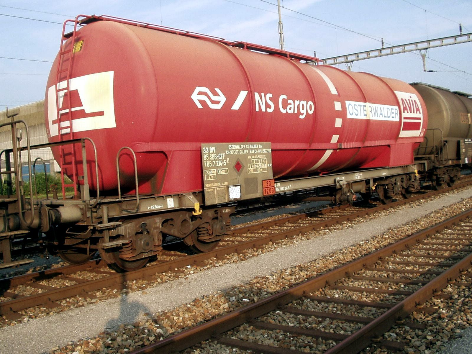 Privatkesselwagen Zans 33857857214-5